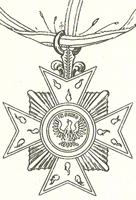 Kruis Orde van de Fenix Hohenlohe publicatie uit 1893